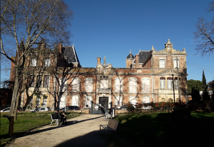 Façade sud du château